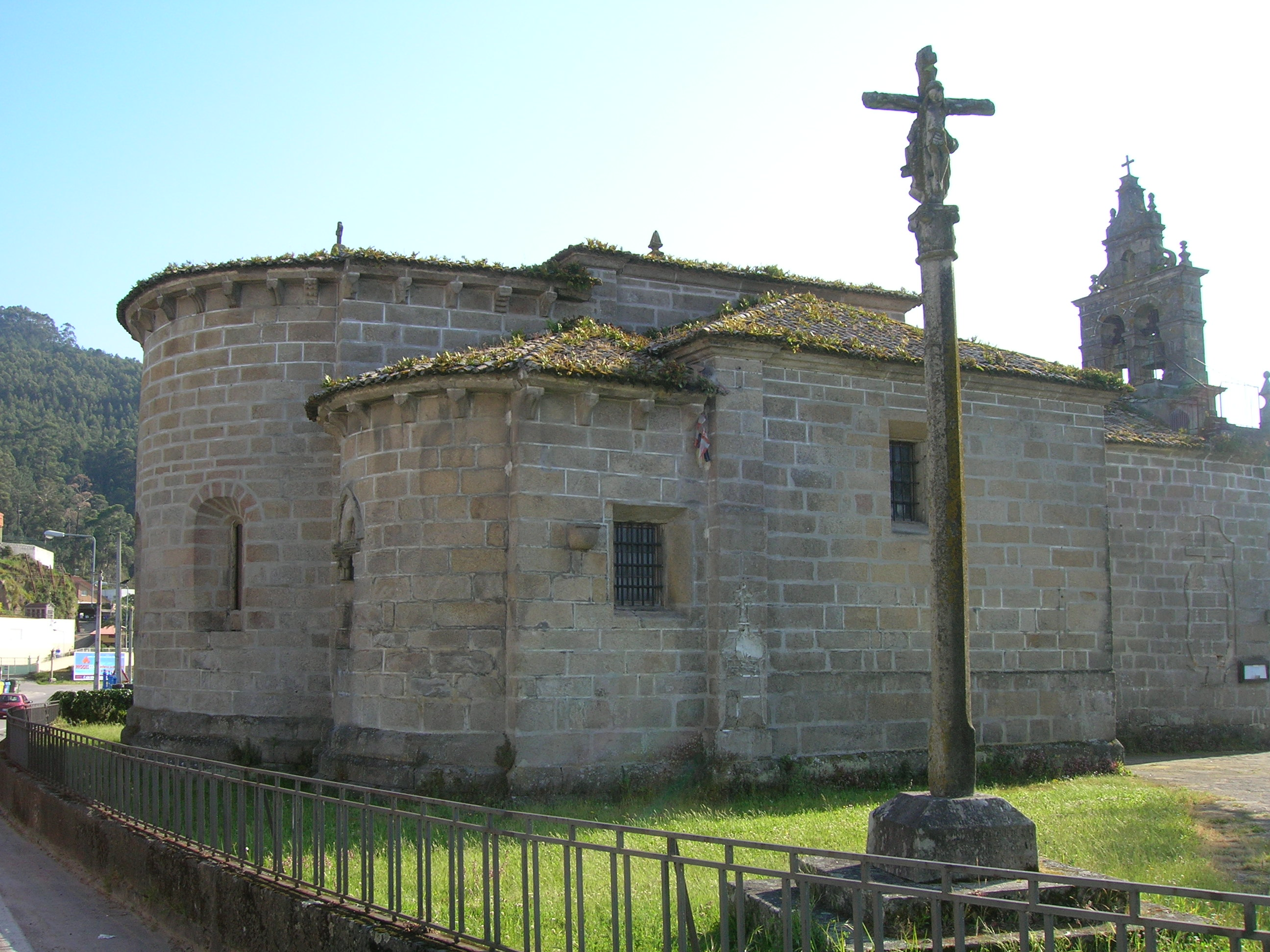 Igrexa de San Salvador de Coruxo, Vigo Fue construida en el siglo XII y perteneció hasta el siglo XIV a una comunidad de monjes benedictinos dependientes del monasterio de Celanova. De su primitiva fábrica románica tan solo se conservan los tres ábsides semicirculares completos.